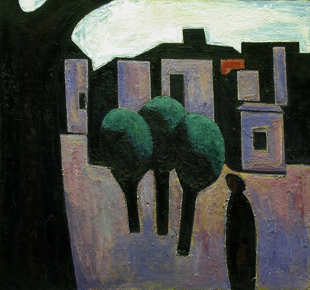 Холст, масло.